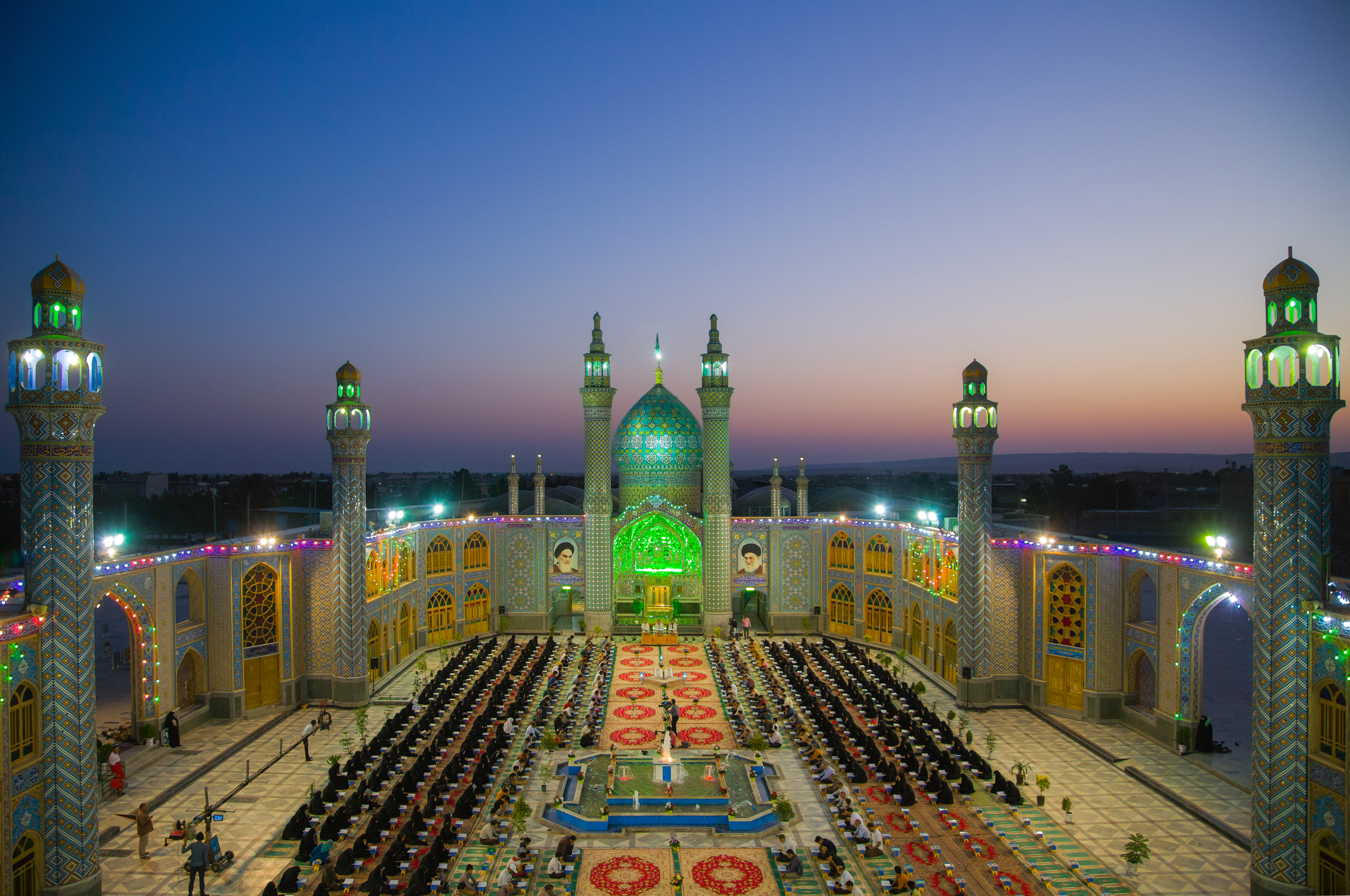 محمد الأوسط بن علي ابن أمير المؤمنين علي بن أبي طالب، هو محمد الأوسط بن علي بن أبي طالب، وأمّه أمامة بنت أبي العاص بن الربيع ابنة زينب بنت النبي محمد،